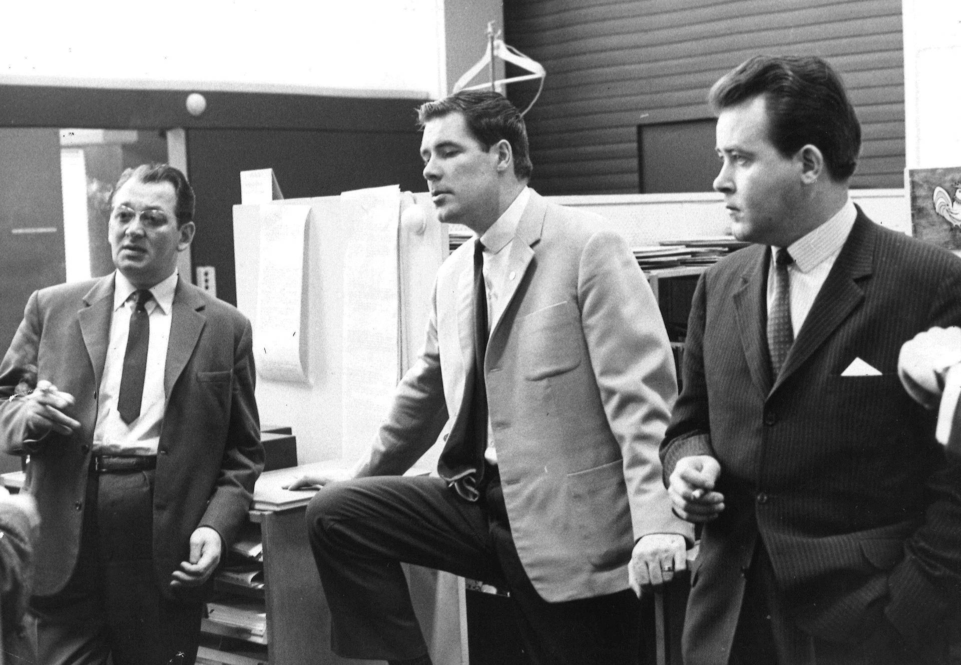 Yleisradion työntekijöitä lakon aikana: uutispäällikkö Börje Holmlund, toimittajat Anssi Kukkonen ja Juhani Lehtola.